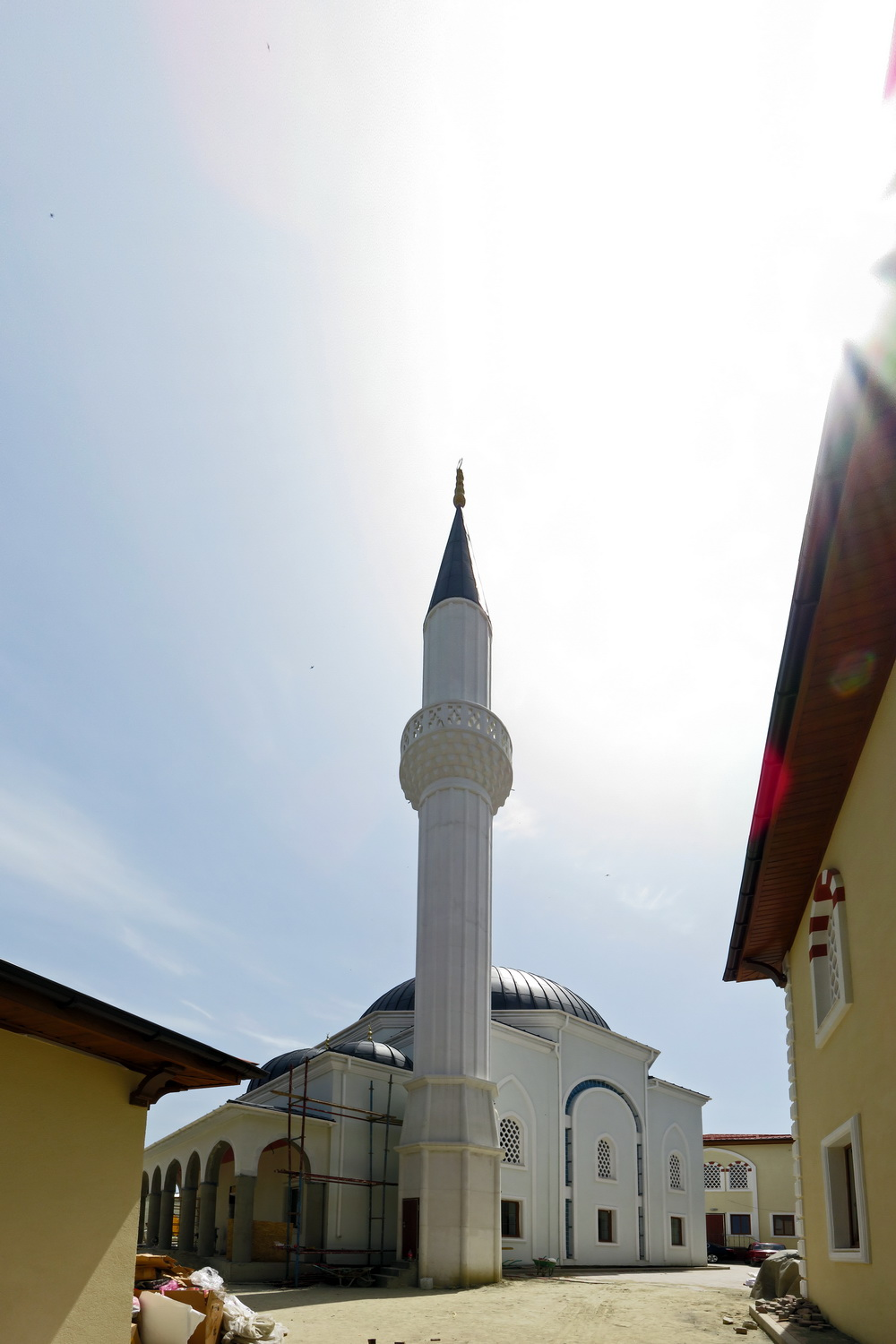 Simferopol, Seit-Settar Jami Mosque